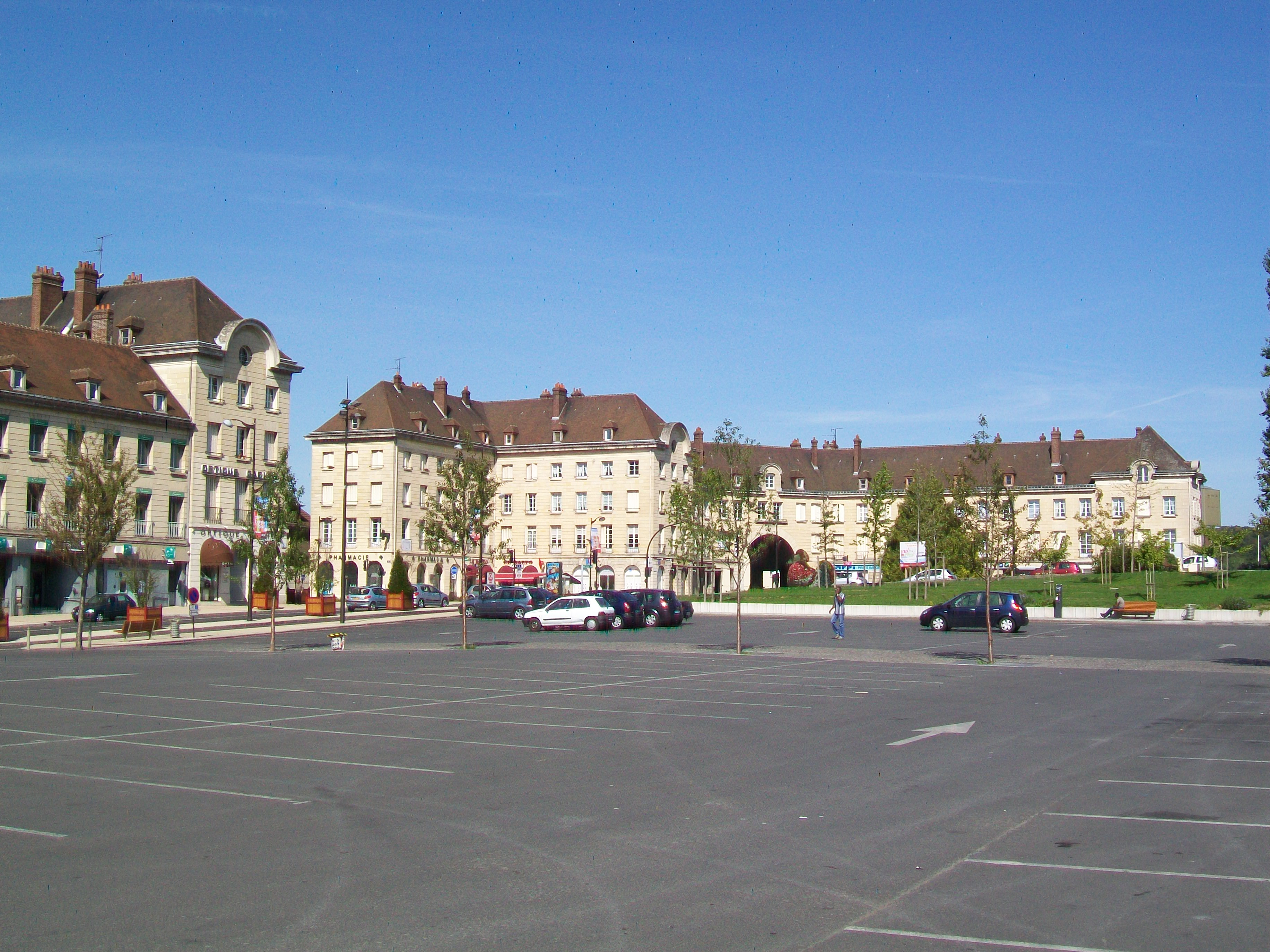 La place Carnot, principal aménagement urbanistique dans le cadre de la reconstruction du centre-ville après les destructions au cours de la Seconde Guerre mondiale.